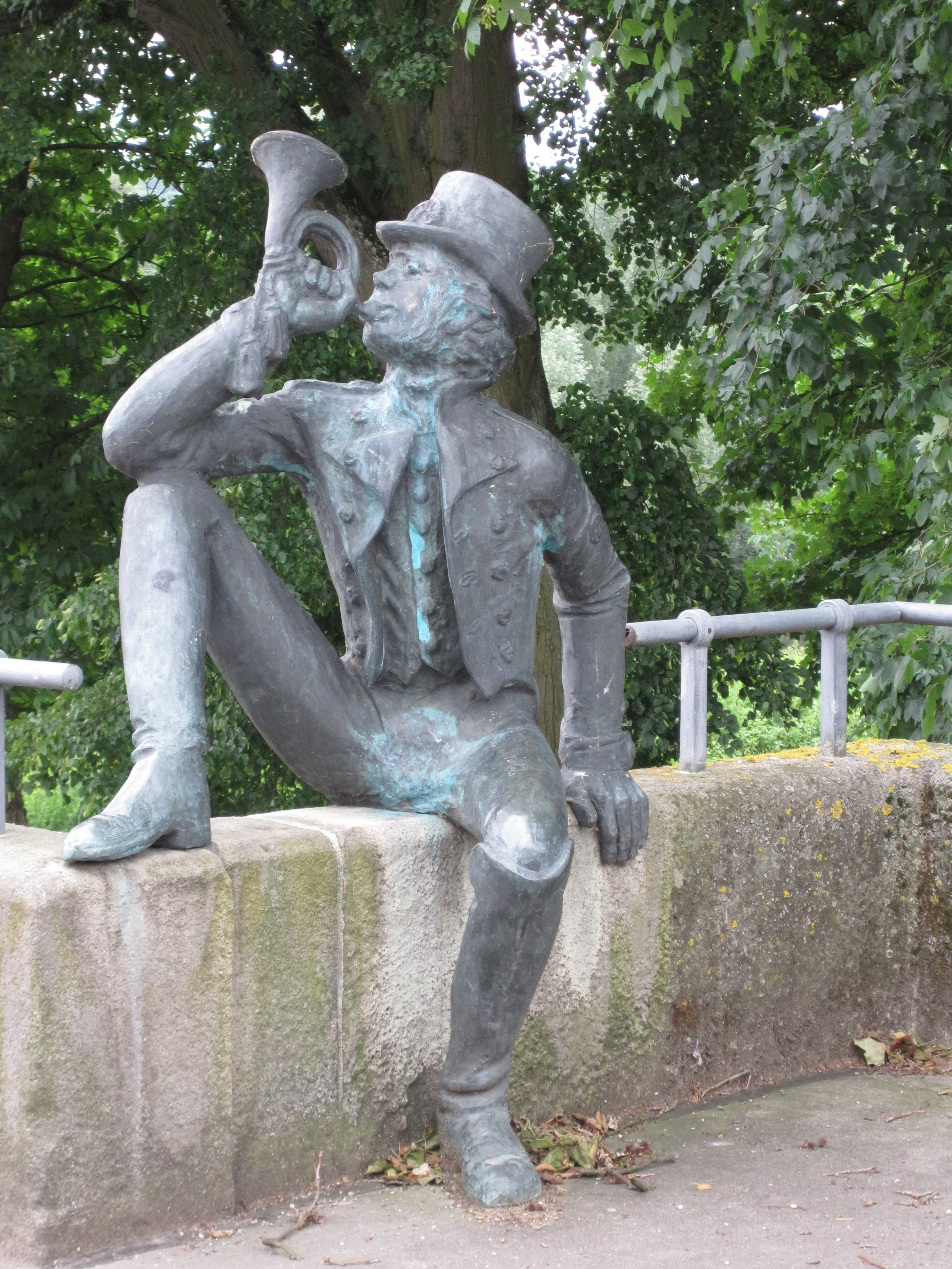 Skulptur, auf der Neckartailfinger Sandsteinbrücke sitzend. Auf einer Tafel daneben steht: 1849 wurde Johann Simon der „vereinigte Postdienst zu Neckarthailfingen mit dem Praedicat eines kgl.württ. Posthalters übertragen“. Neckartailfingen mit seiner 1847 eingeweihten Brücke war damals ein wichtiger Knotenpunkt der Post- und Reisestrecke Stuttgart—Friedrichshafen. An diese Zeit erinnert unsere Postillon-Figur. 1982